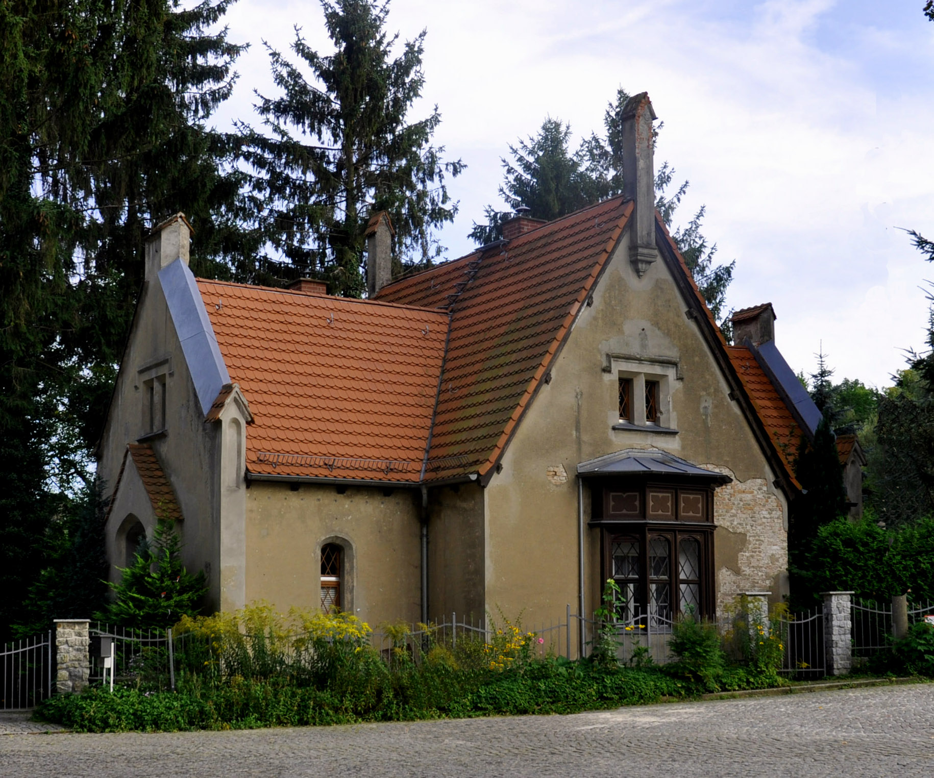 Die prinzliche Unterförsterei Klein-Glienicke, Waldmüllerstraße 13, Potsdam